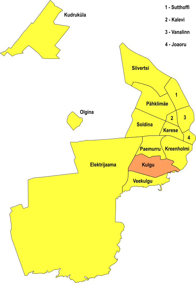 Kulgu linnaosa asukoht Narvas